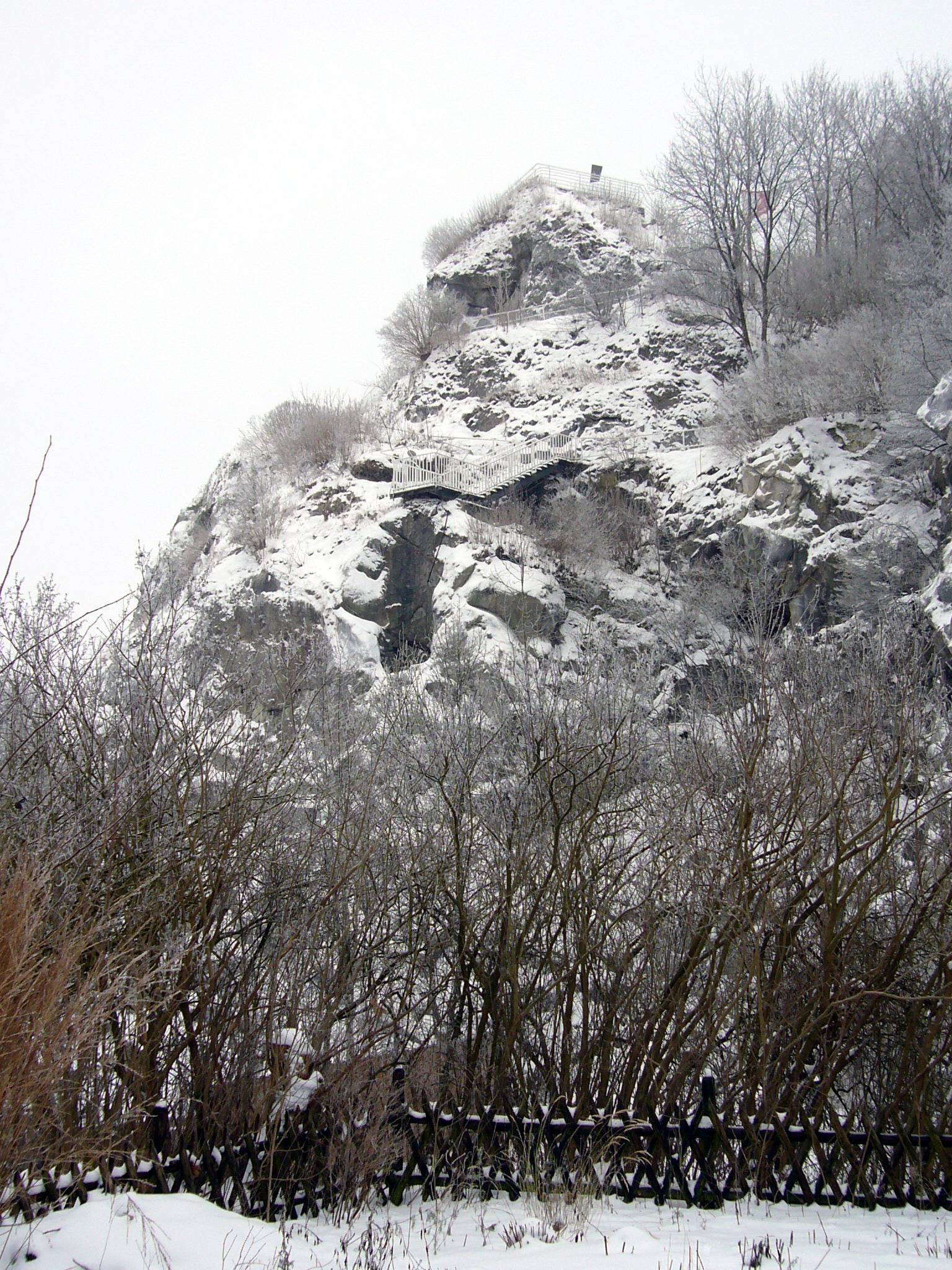 Kalkberggipfel und Brunnenschacht mit Besichtigungsplattform im Winter